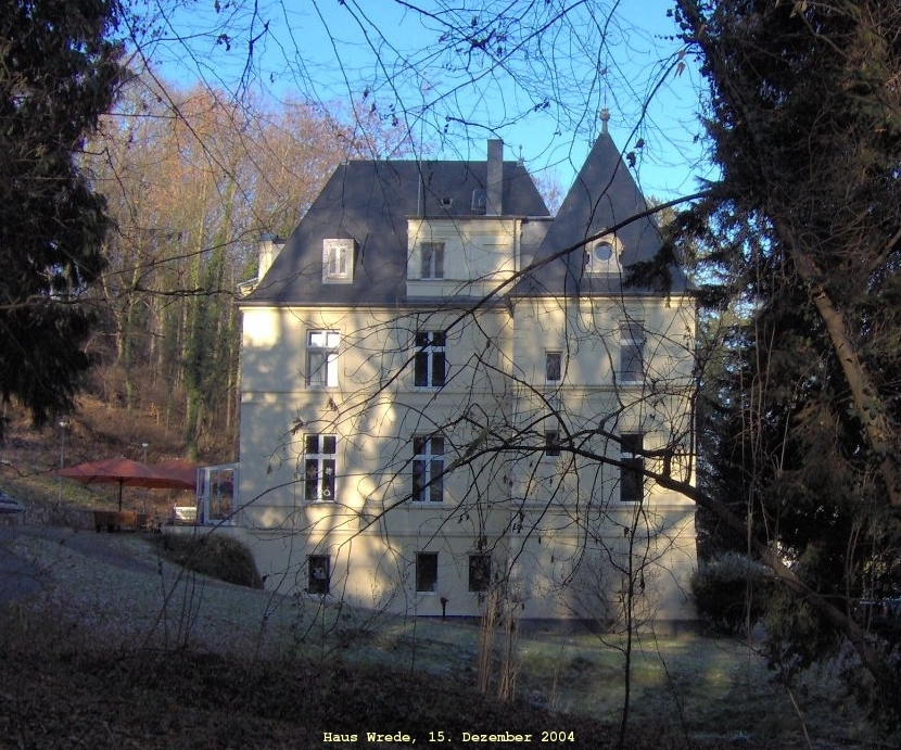 Haus Wrede in Bornheim-Roisdorf